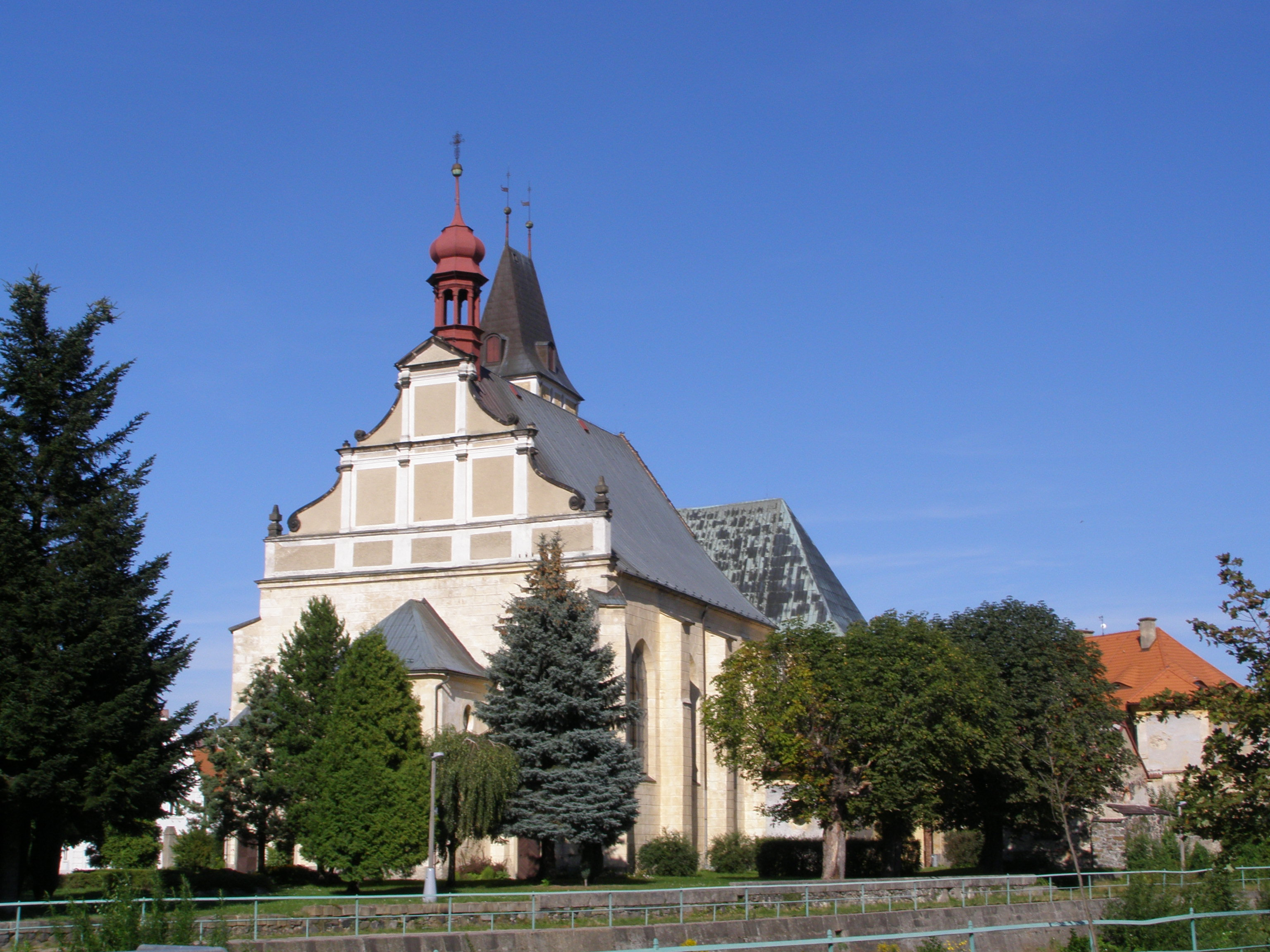 Frýdlant, kostel Nalezení svatého Kříže